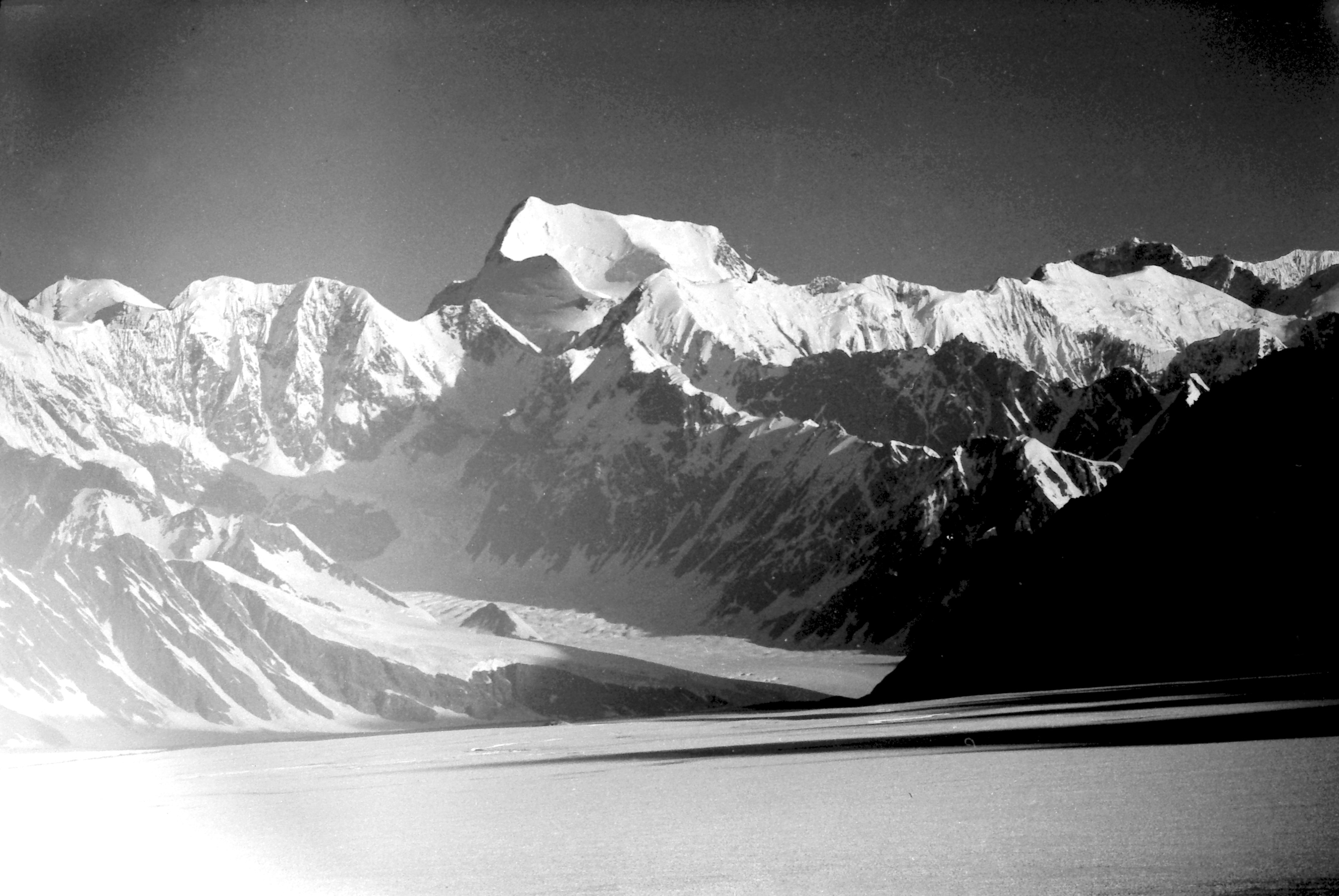 Ekspeditsioon mäetipule "Tartu Ülikool 350". Kommunism.